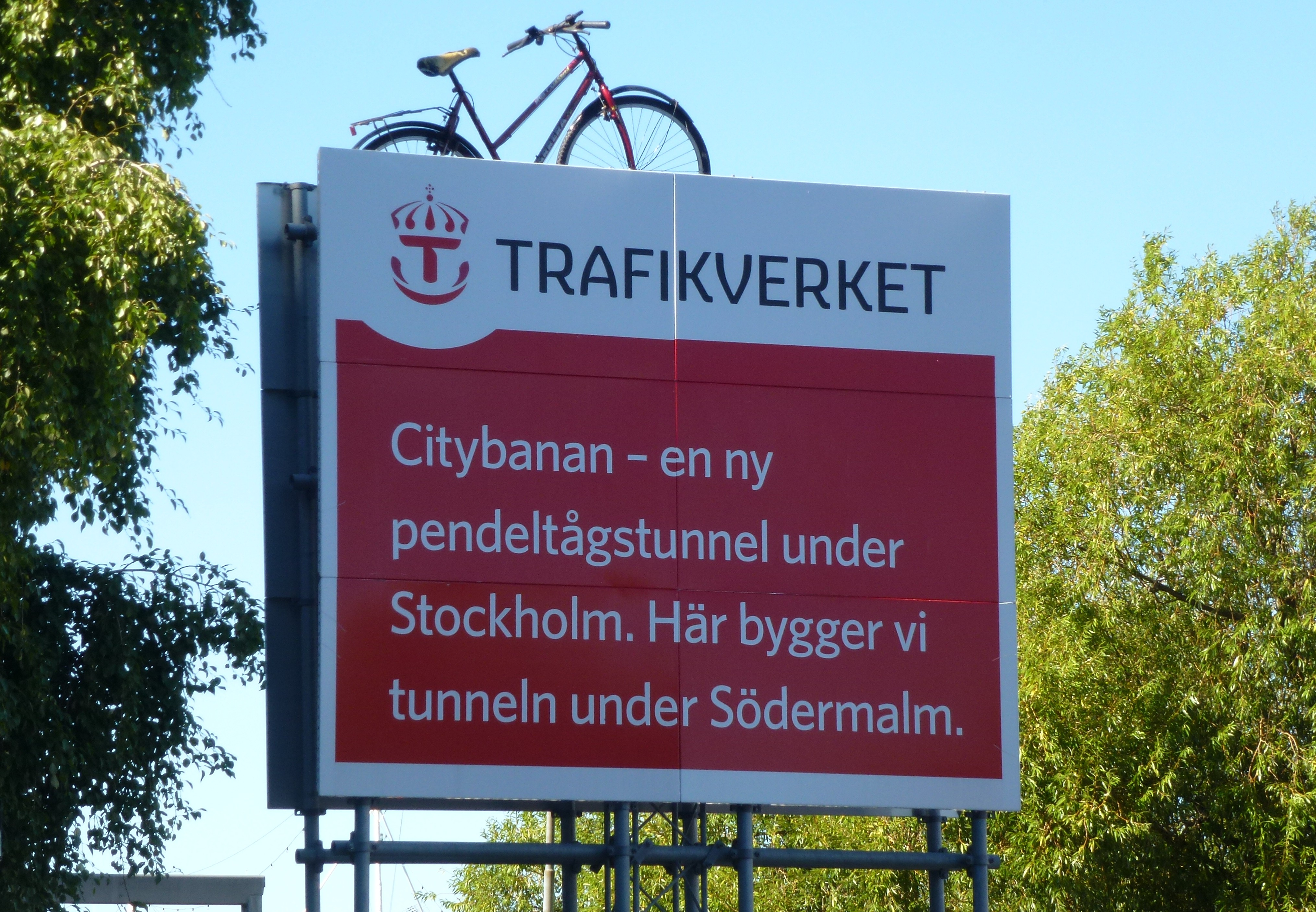 Trafikverkets skylt vid Södertunneln